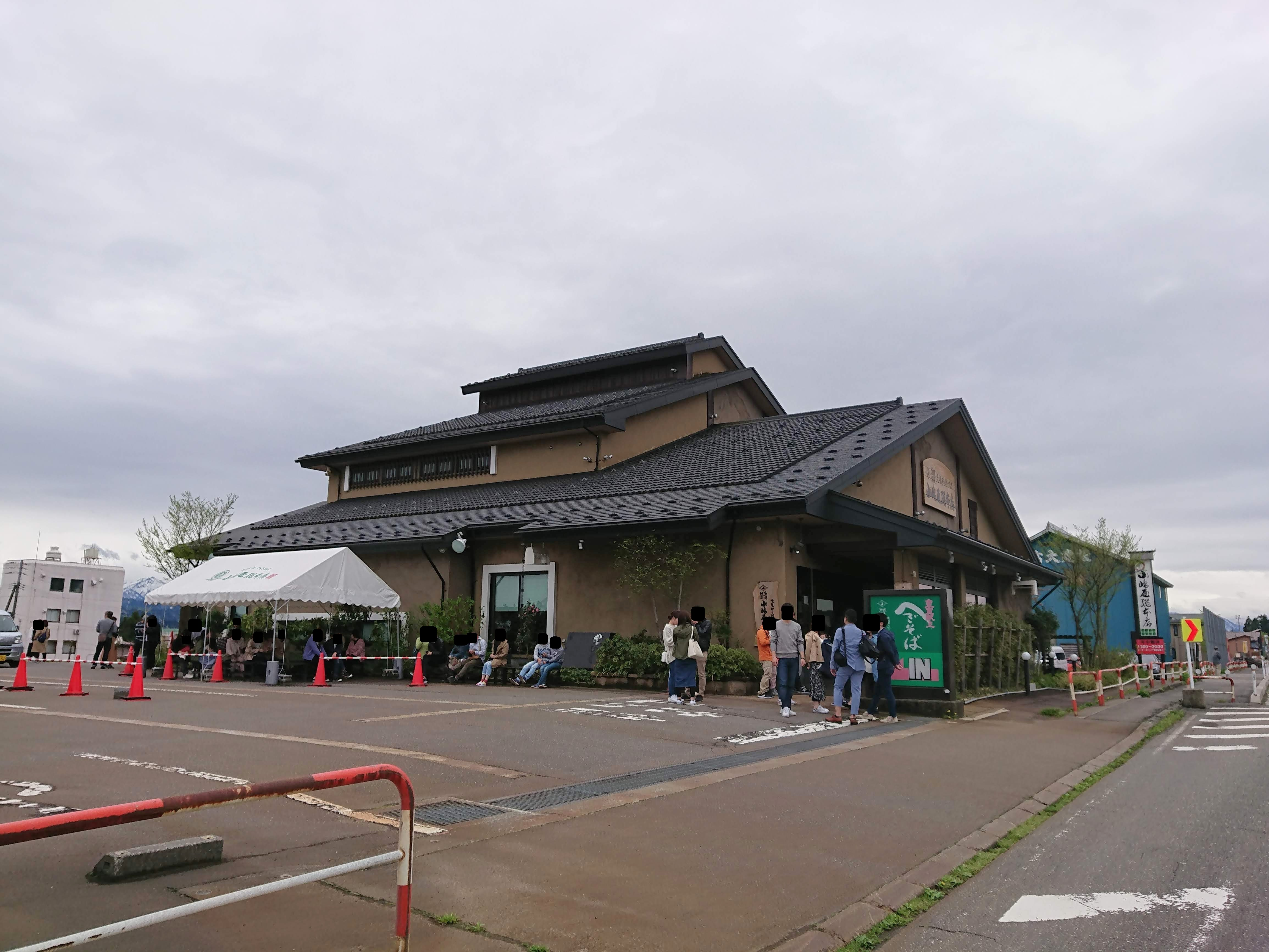 小嶋屋総本店